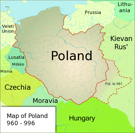 Mapa Polski w latach 960 - 992